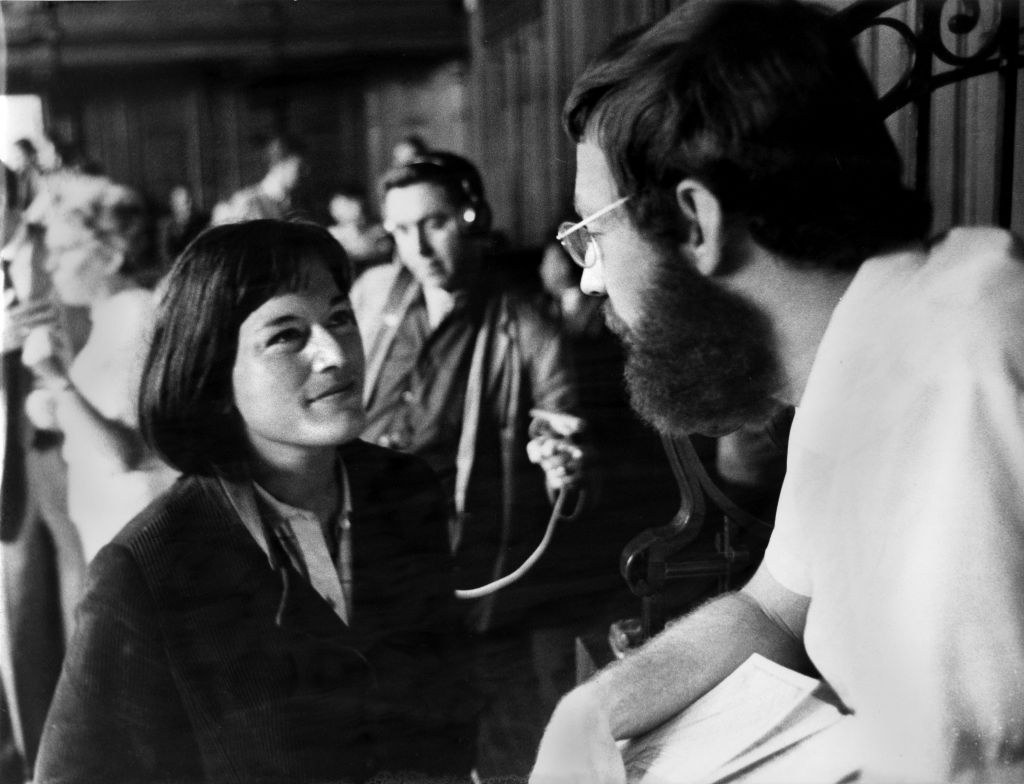 Ludwig Binder: Studentenrevolte 1967/68, West-Berlin; veröffentlicht vom Haus der Geschichte der Bundesrepublik Deutschland, Fritz Teufel spricht im Gerichtssaal mit Dorothea Ridder (7. Juli 1967), Hintergrund: Fritz Teufel und Rainer Langhans waren im sogenannten „Brandstifter-Prozess“ angeklagt